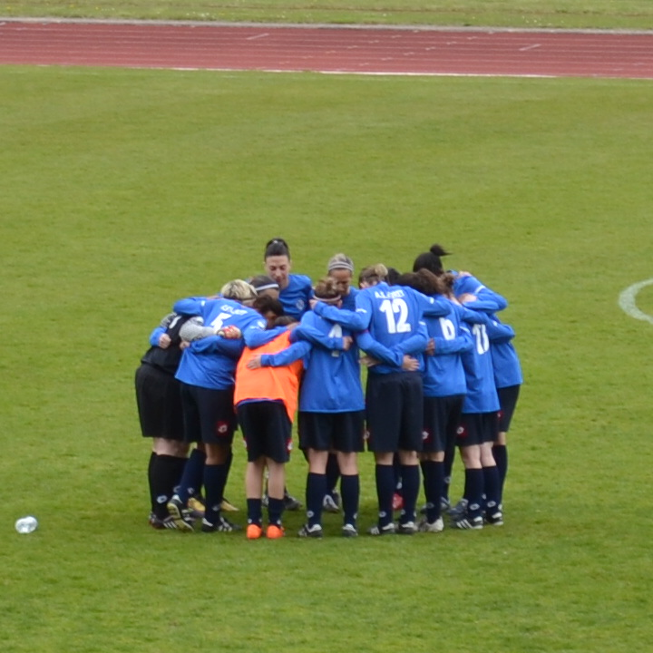 8 avril 2012, Rencontre de championnat de premier division face au FCF Juvisy Moment de solidarité (score de 4 à 1 pour Juvisy)